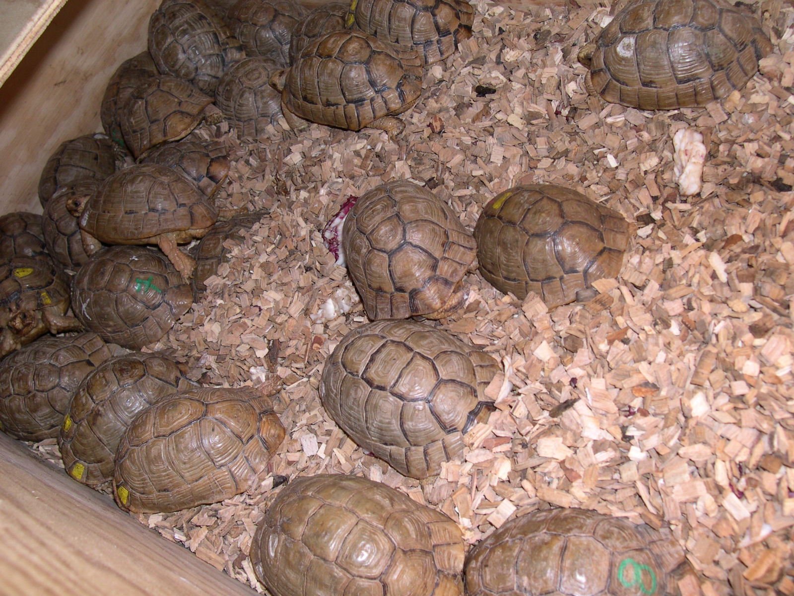 Da sequestro effettuato dal Corpo Forestale dello Stato nel 2006, su una nave cargo attraccata al Porto di Genova e proveniente dall'Africa mediterranea, momentaneamente affidate alle cure dei custodi del rettilario del Bioparco di Roma